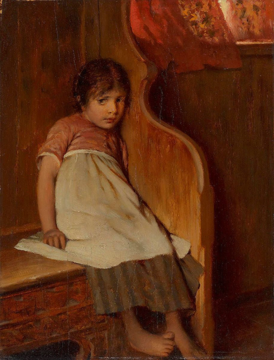 Die Schüchterne. Signiert. Öl auf Holz.